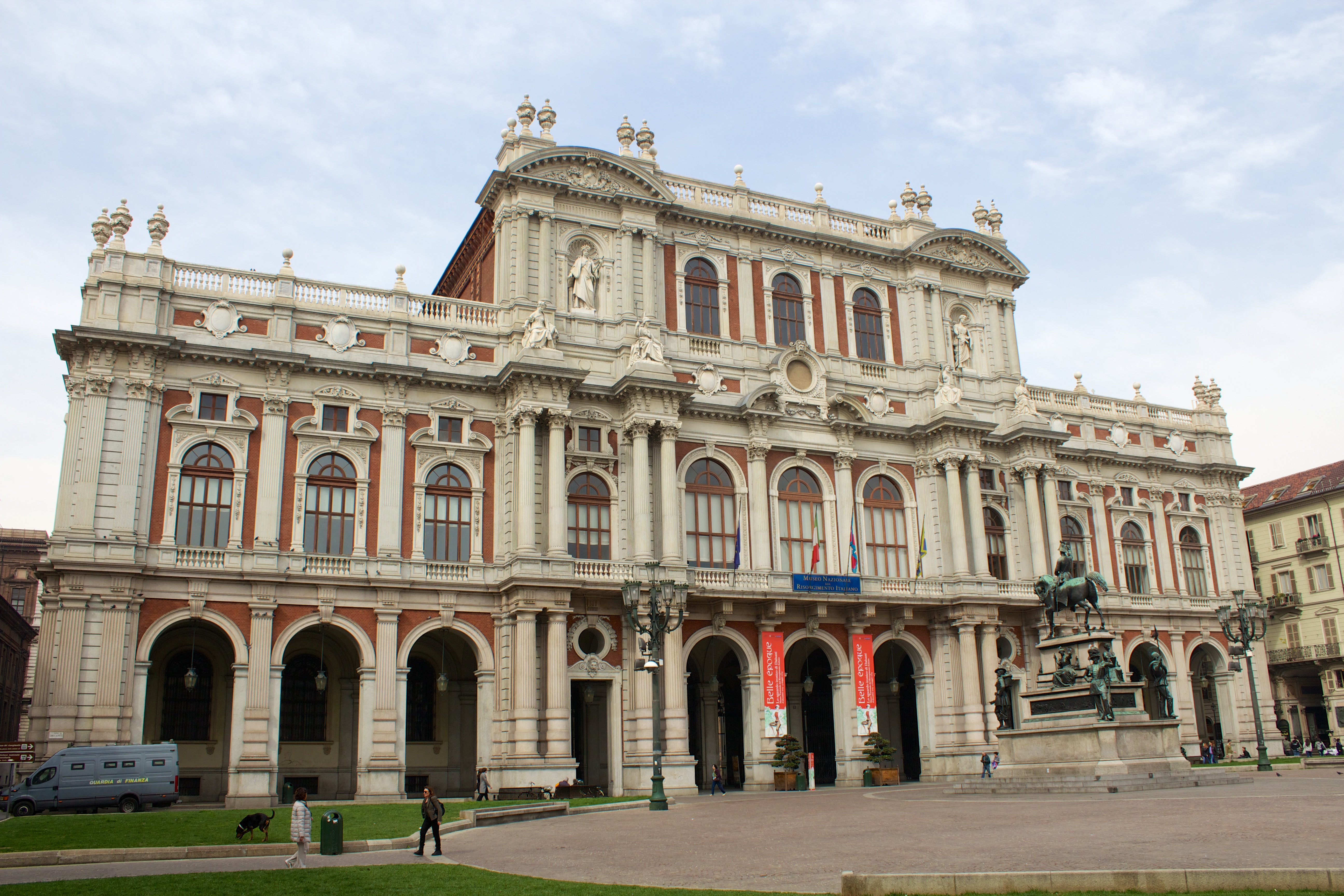 Palazzo Carignano a Torino da Piazza Carlo Alberto